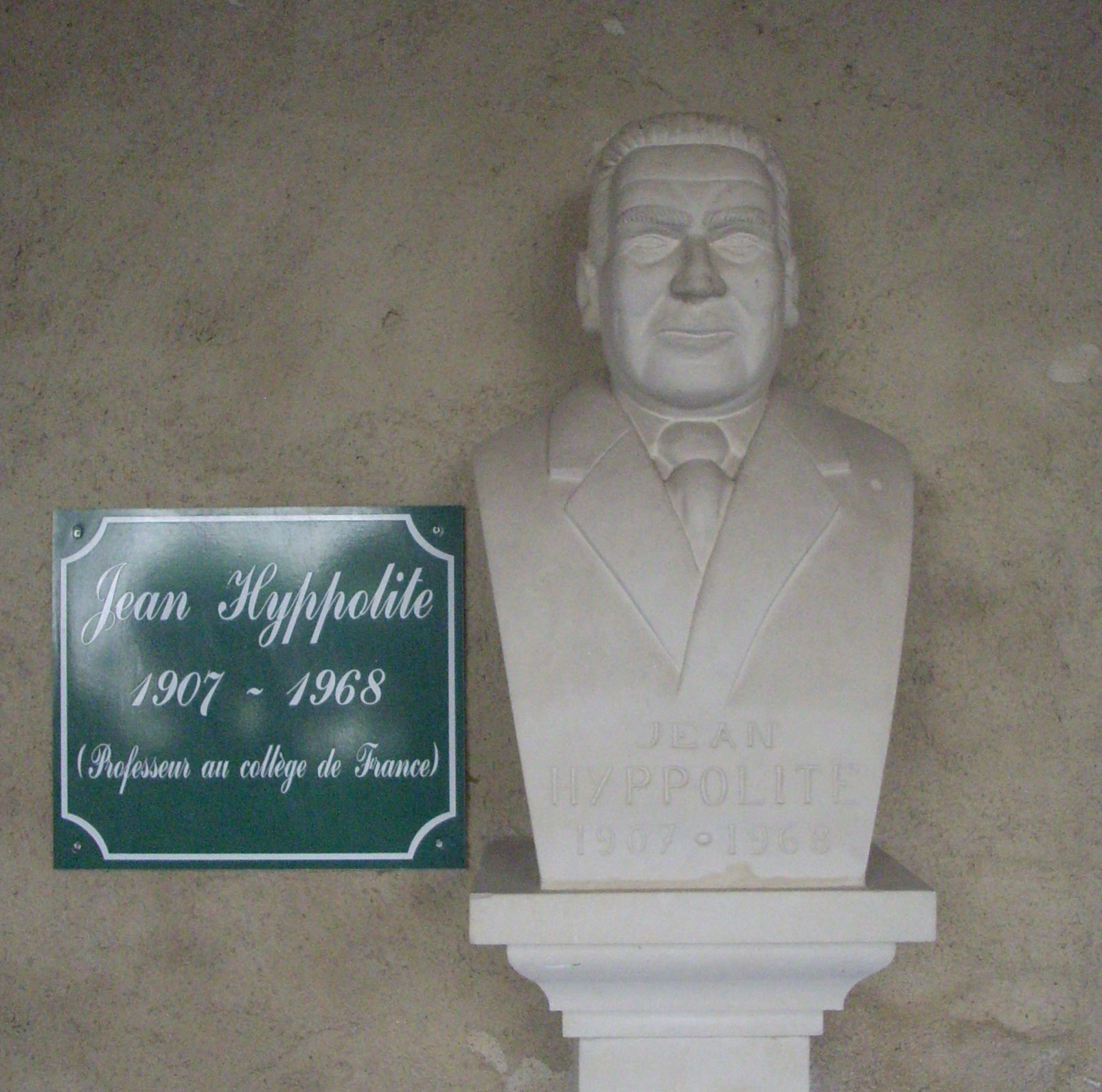 Buste de Jean Hyppolite au Cloitre des Carmes, Jonzac, France. Cour intérieure.